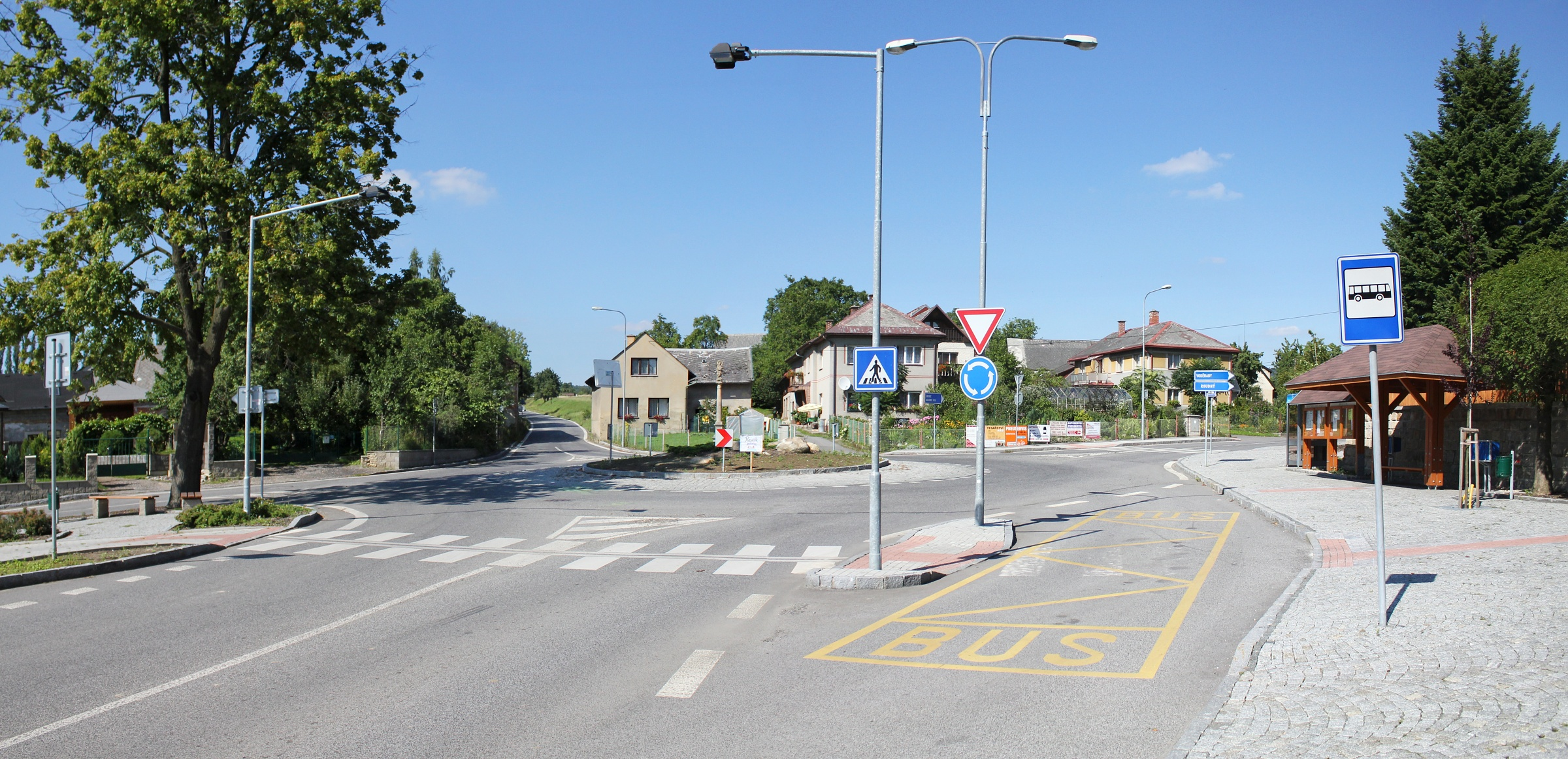 Kruhový objezd a autobusová zastávka v centru obce Jenišovice (pohled směrem od Turnova, vpravo směr Kaškovice, přímo Odolenovice, vlevo Paceřice), za kruhovým objezdem sloup se sochou Panny Marie